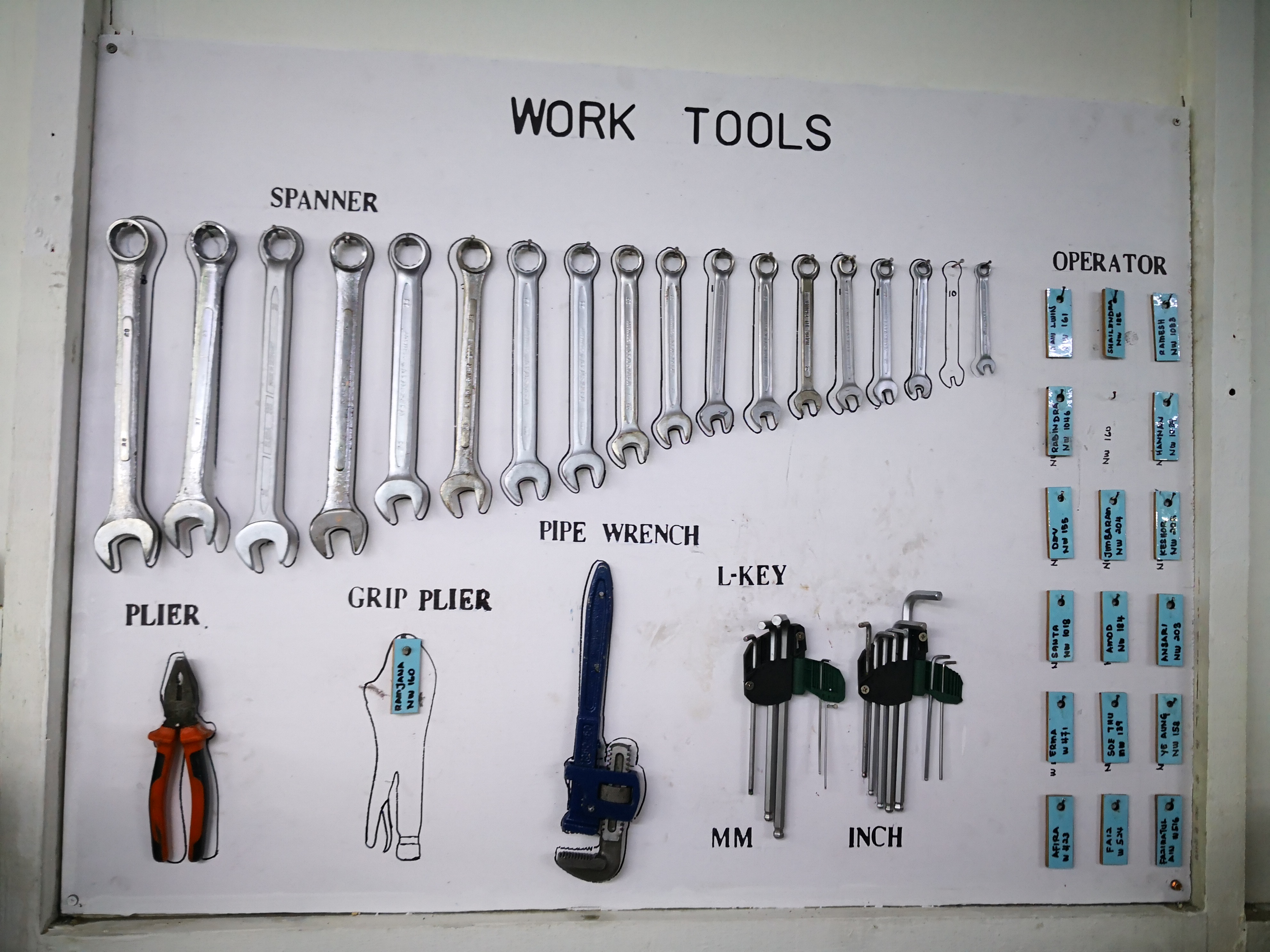 Shadow board merupakan salah satu alatan 5S yang bertujuan untuk menunjukan barangan yang ada di sesuatu stesen dan jika tiada boleh menunjukan alatan itu dipakai oleh siapa. Gambar ini diambil di kilang Claytan